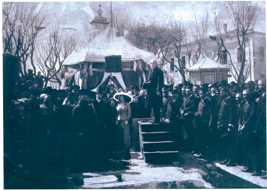 Снимка на Иван Церов, кмет на Варна (1909–1912 г.), при полагането на основния камък при строежа на градския театър.